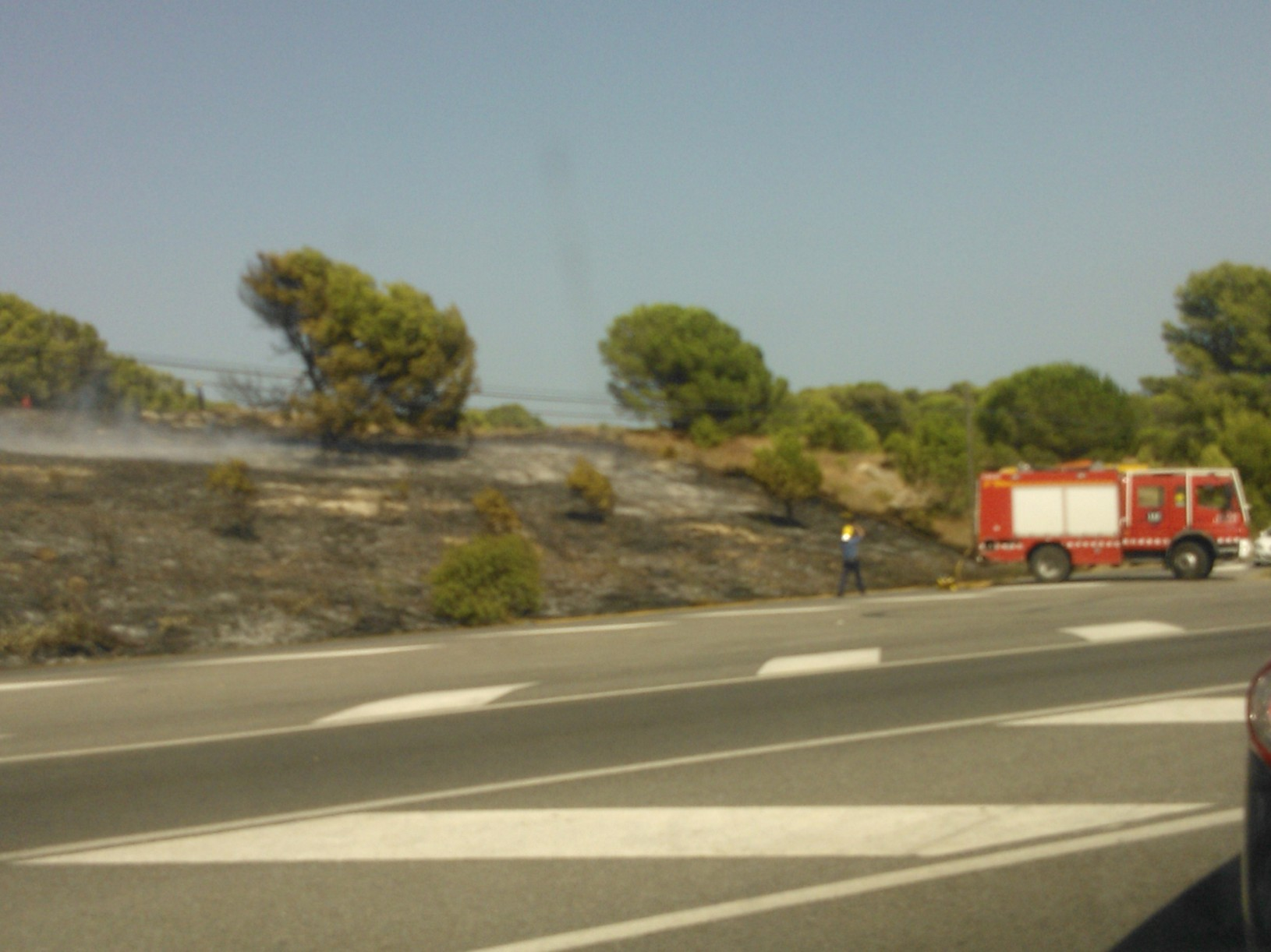 Actuació dels Bombers de la Generalitat en un incendi forestal (agost 12').